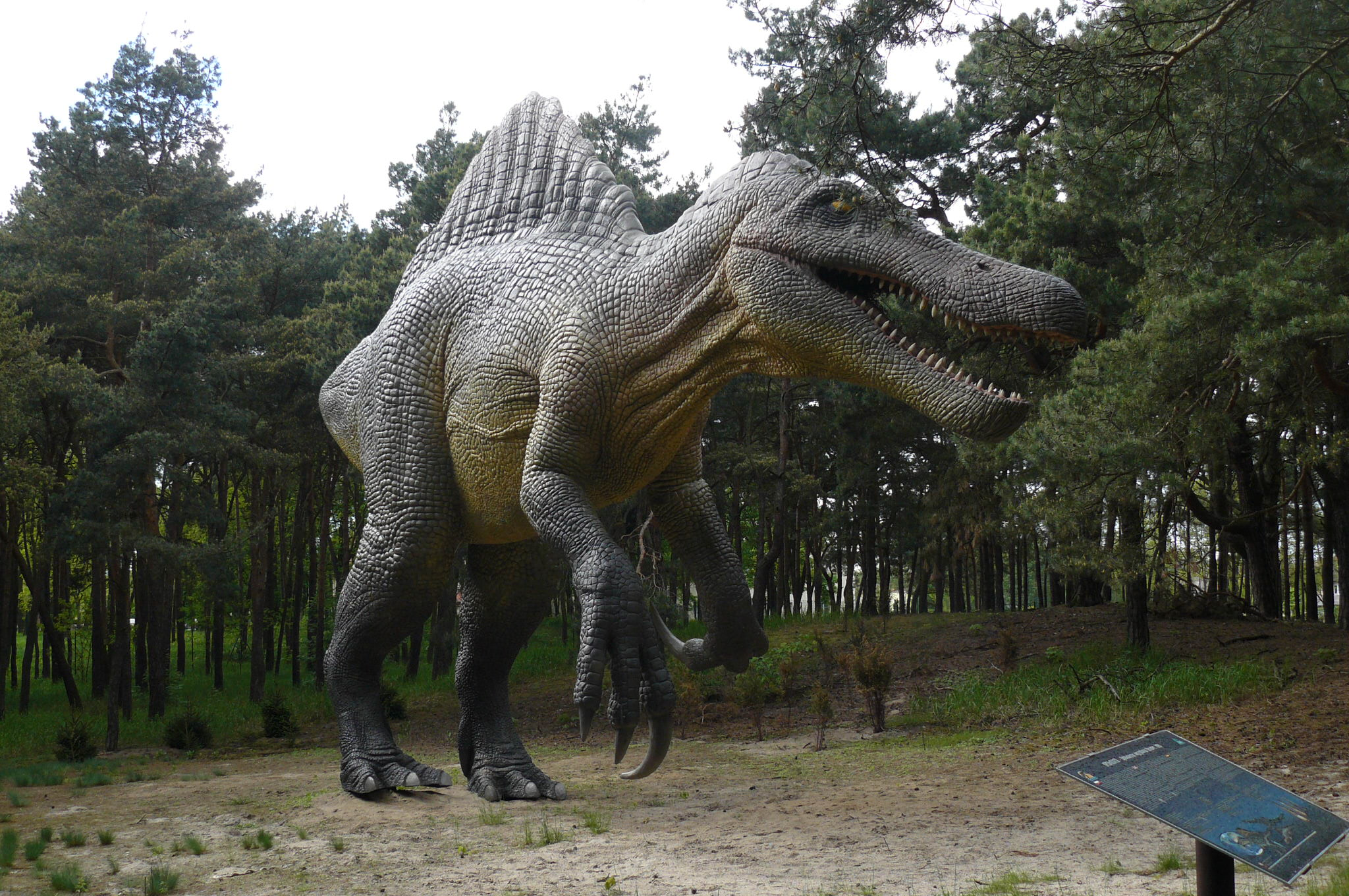 JuraPark Sole Kujawski.